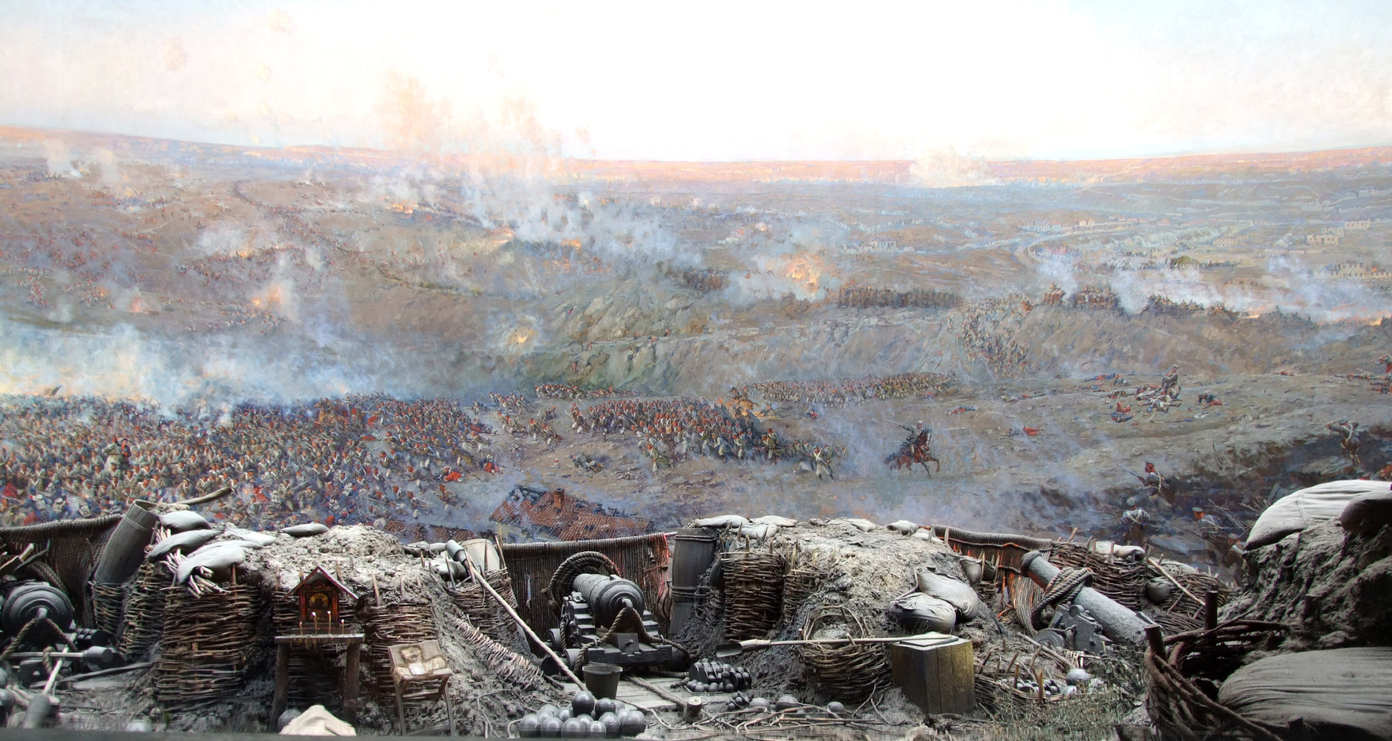 Меморіальний комплекс пам'яток оборони міста в 1854 - 1855 роках "Історичний бульвар" 1905 - 1959 роки